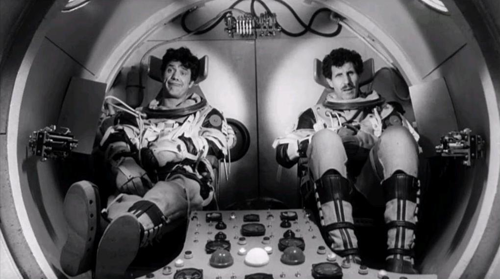 Fotogramma del film 002 Operazione Luna (1965)